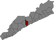 Localització de Sant Vicenç de Moltalt al Maresme